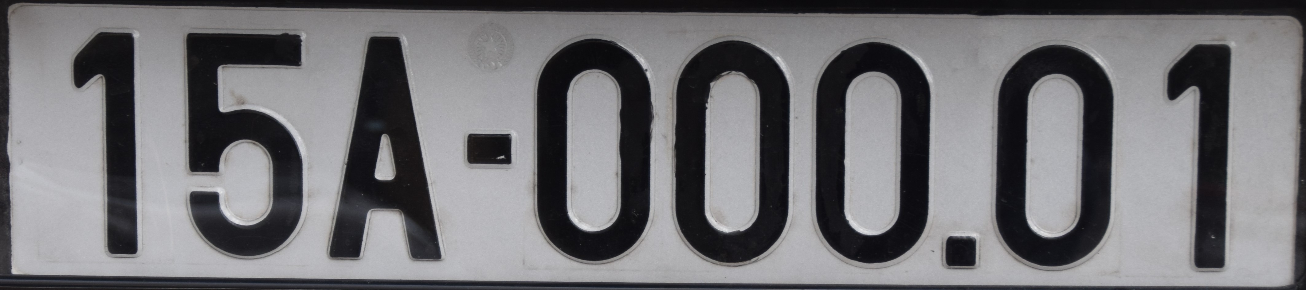 Kentekenplaat Vietnam